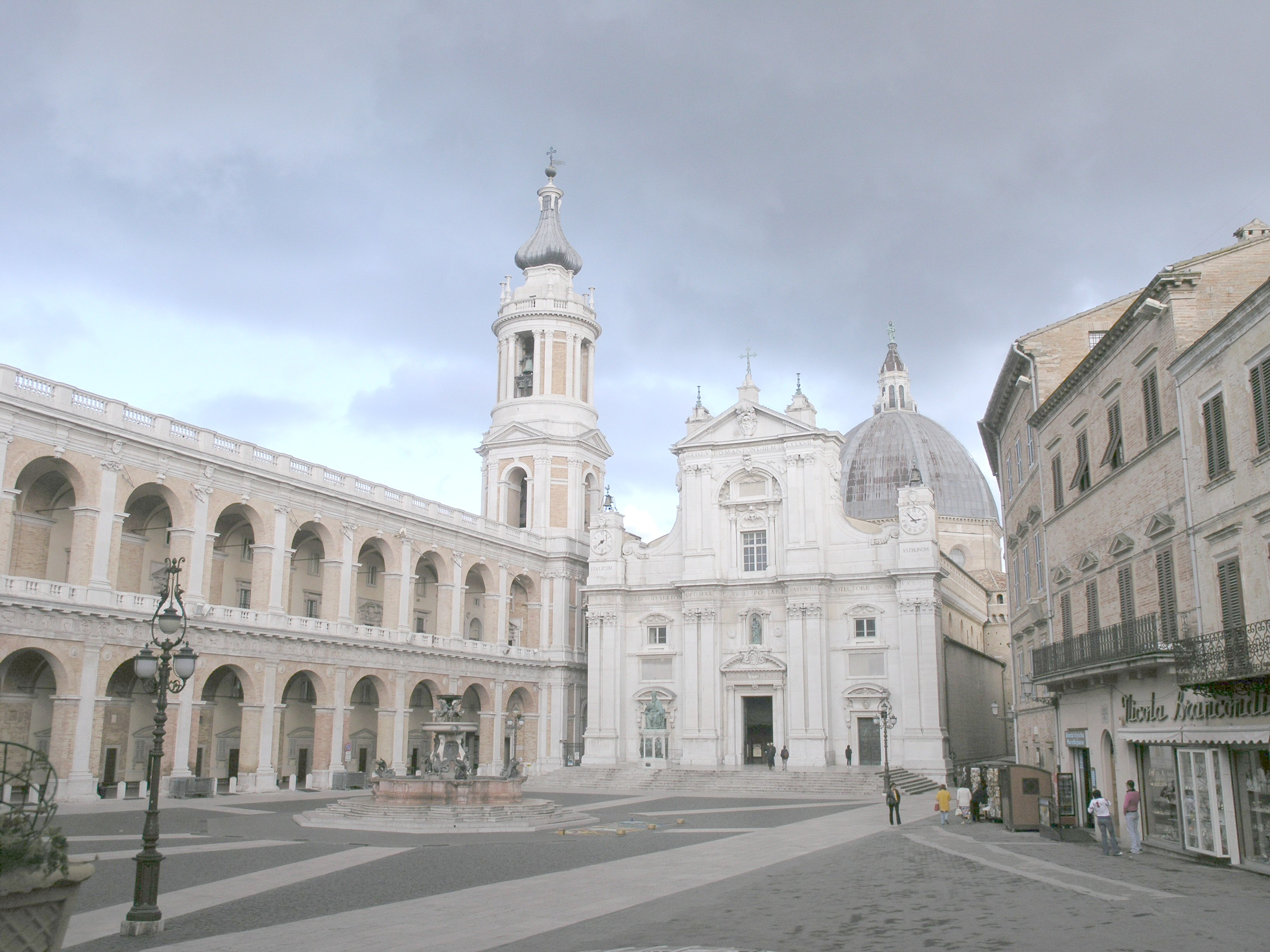 Loreto Basilika Fassade